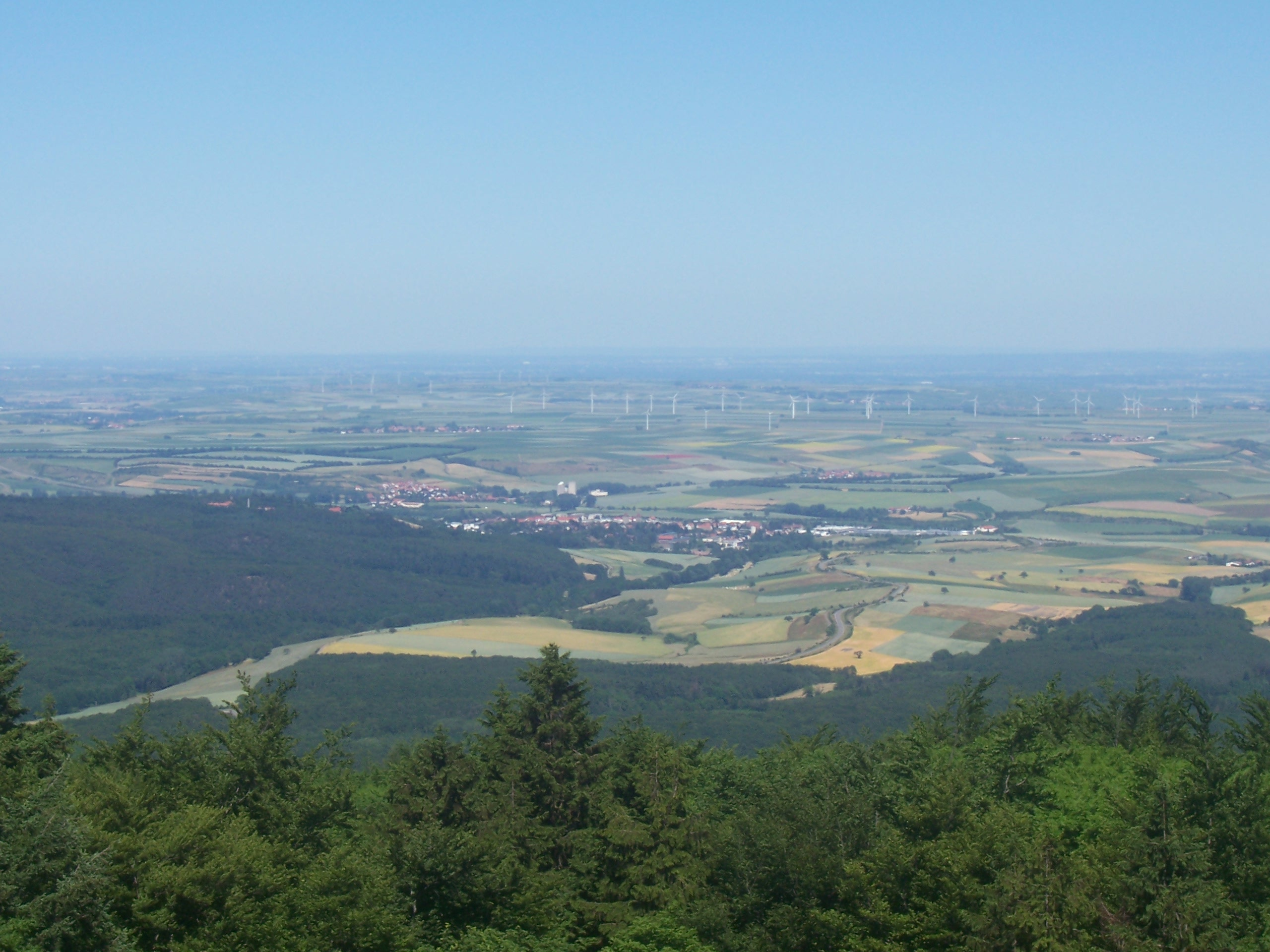 Bick vom Ludwigsturm auf dem Donnersberg gen Nordosten, der Ort im Mittelgrund ist Kirchheimbolanden